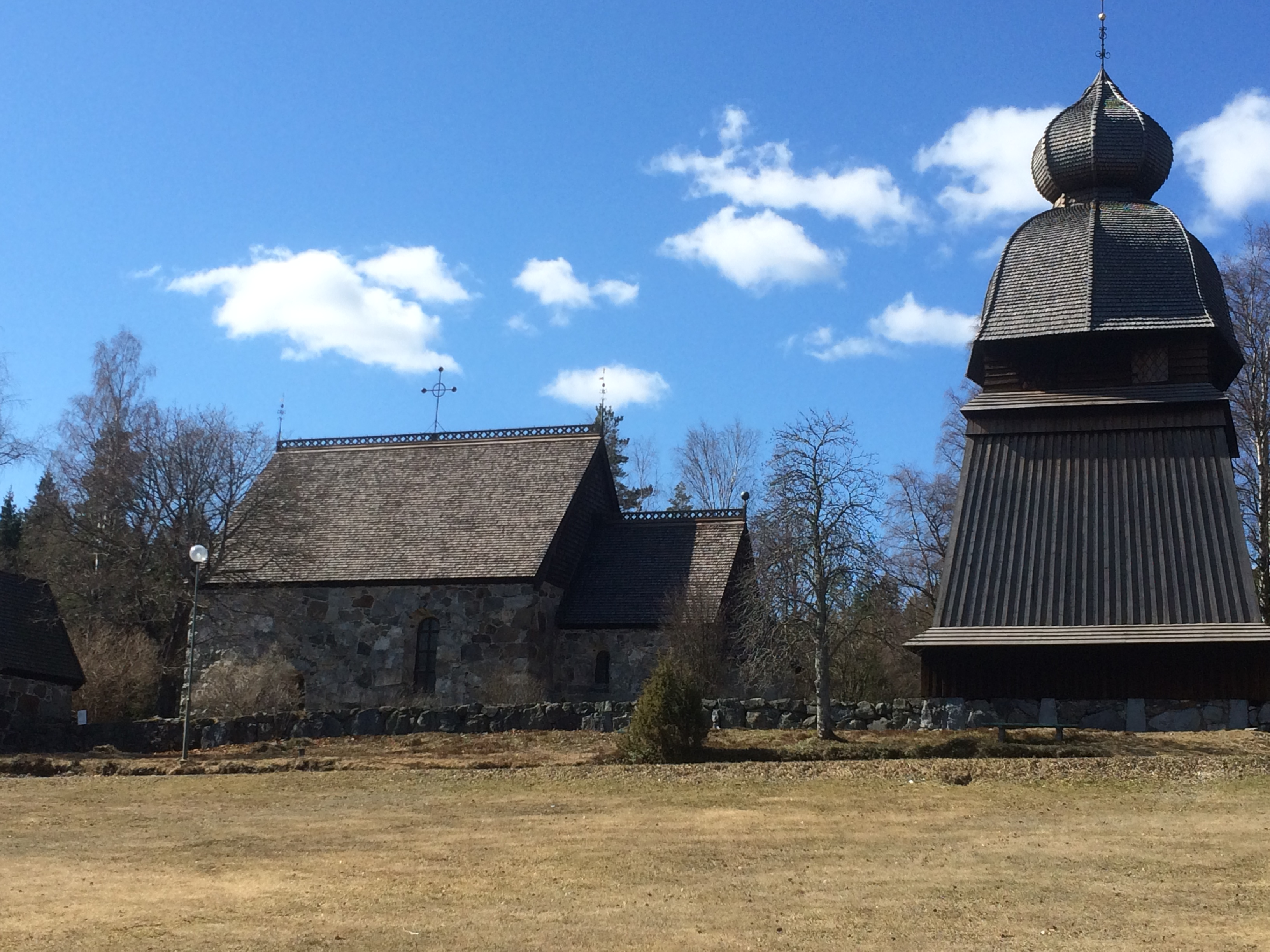 Murbergskyrkan på Murberget i Härnösand.